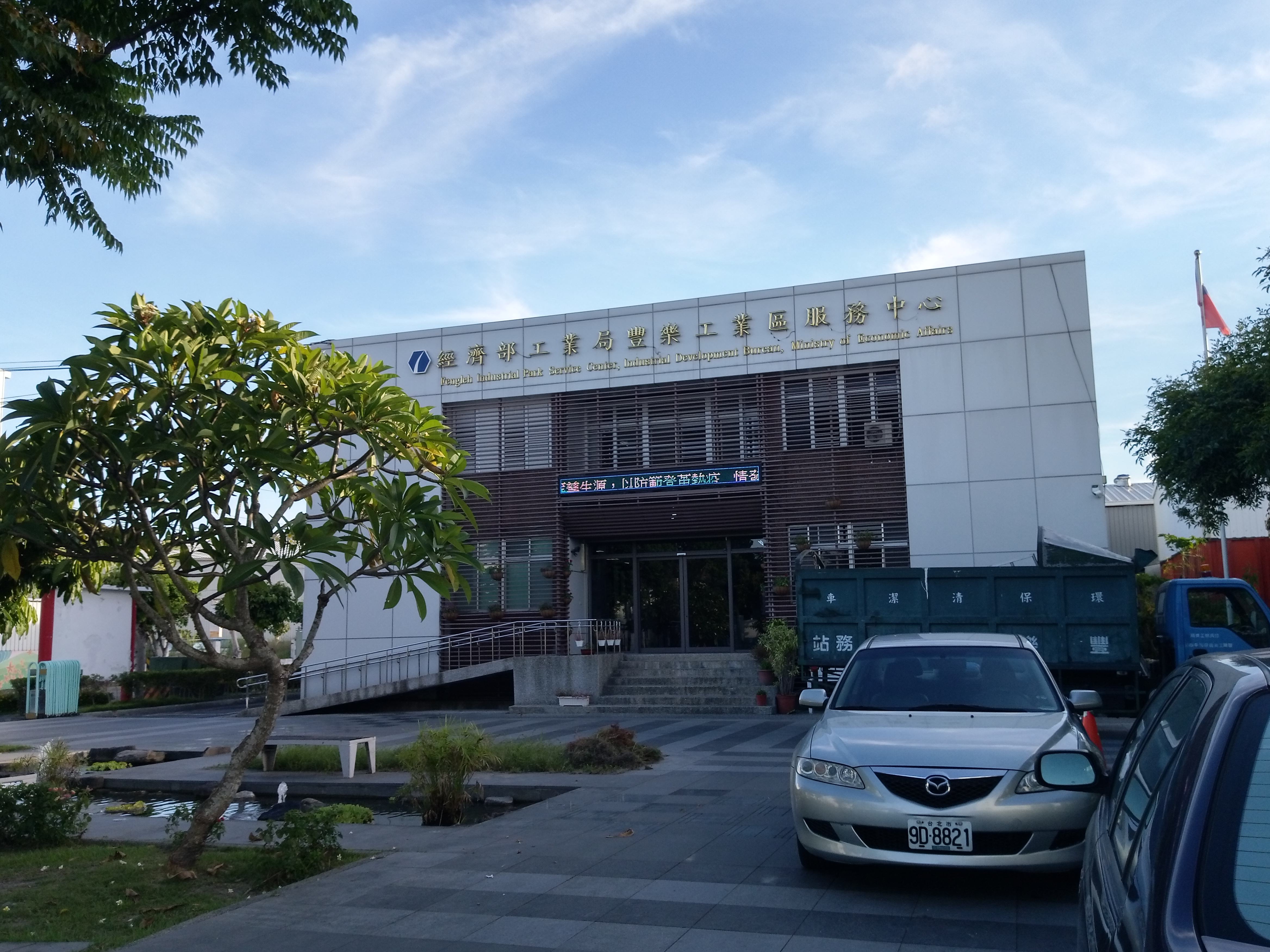 經濟部工業局豐樂工業區服務中心